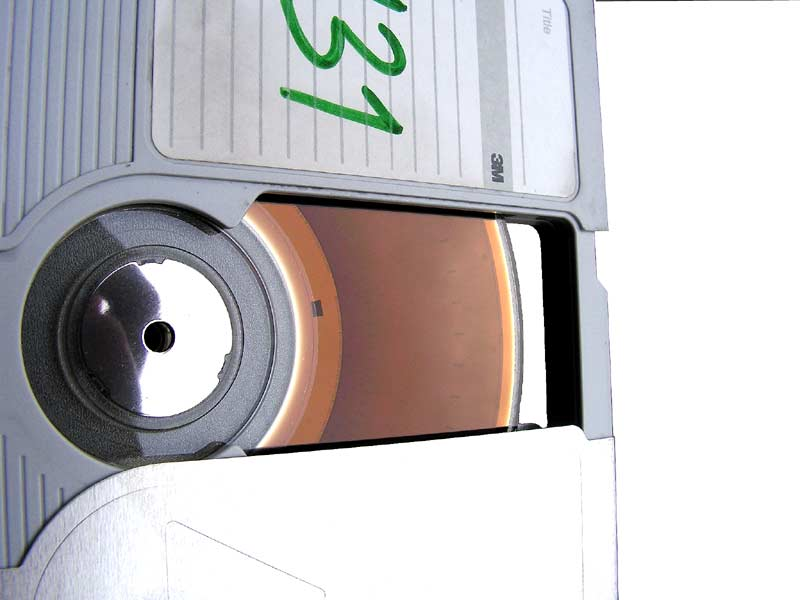 Opened magnetooptical disc